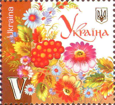 Поштова тематична марка № 1048 (Петриківський розпис)